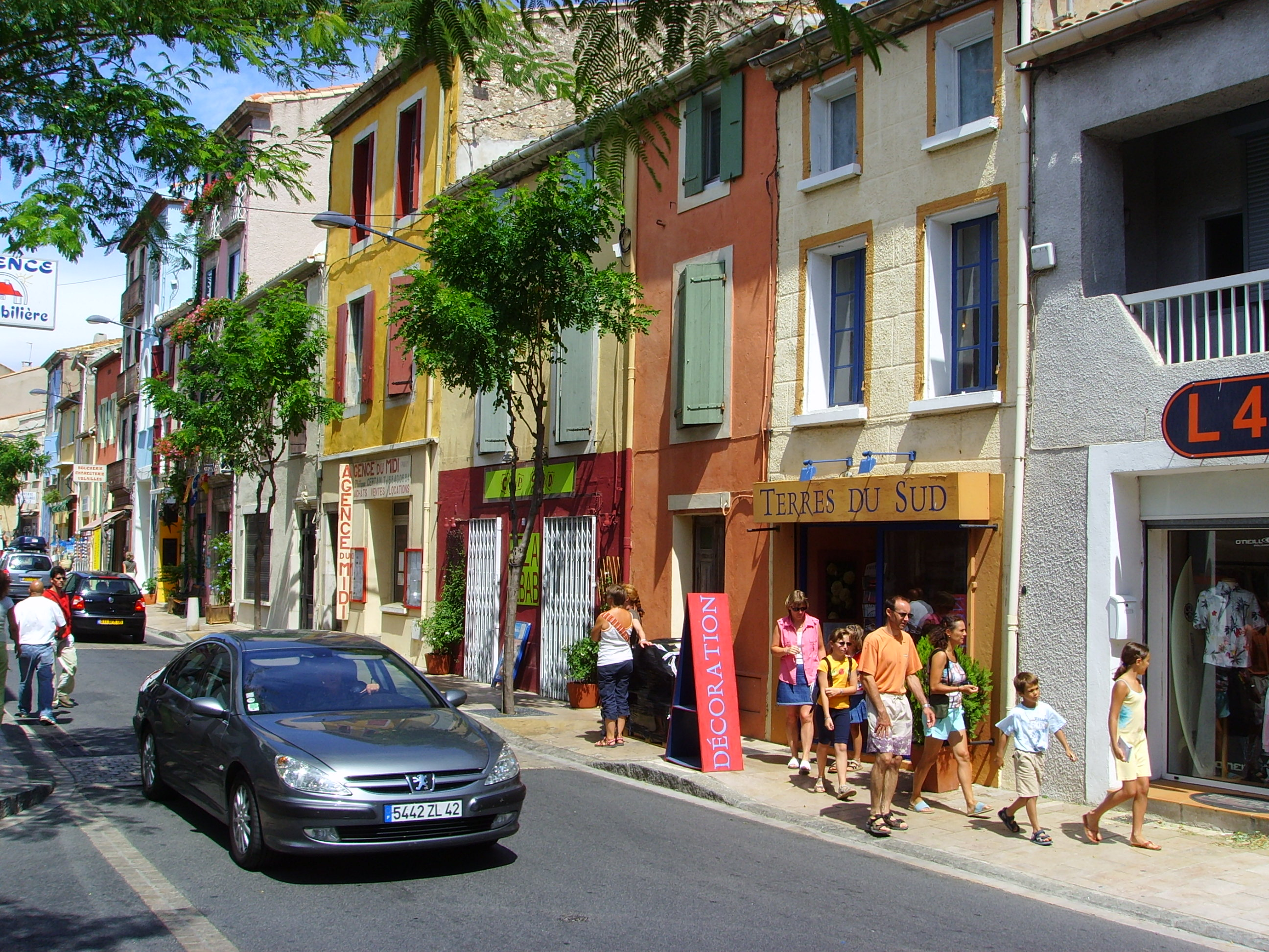 Leucate, Aude, France: Leucate Village.